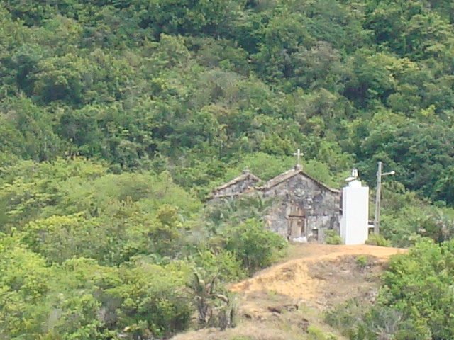 Igreja N. S. de Guadalupe, Salvador, Bahia, Brasil.